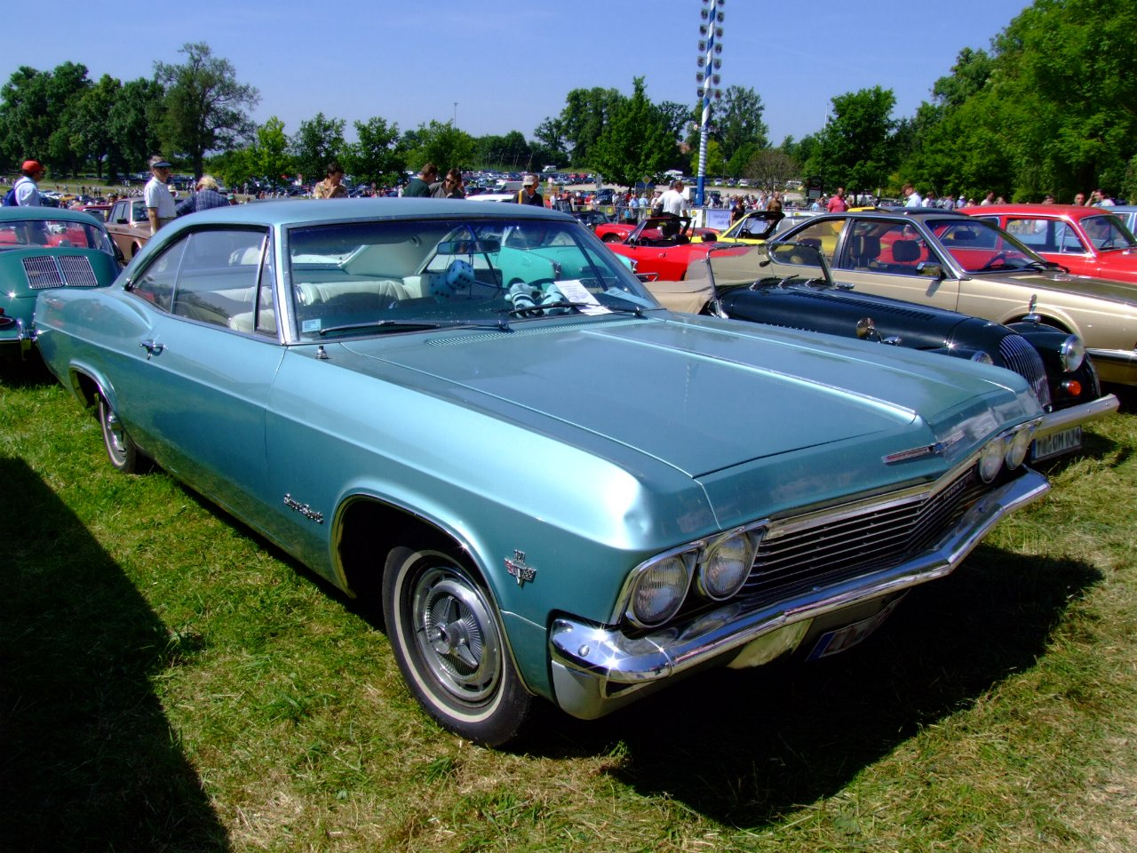 Chevrolet Impala SS Baujahr: 1965 250 PS